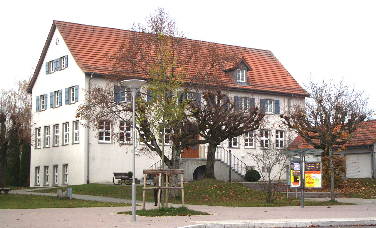 Horgenzell: Rathaus